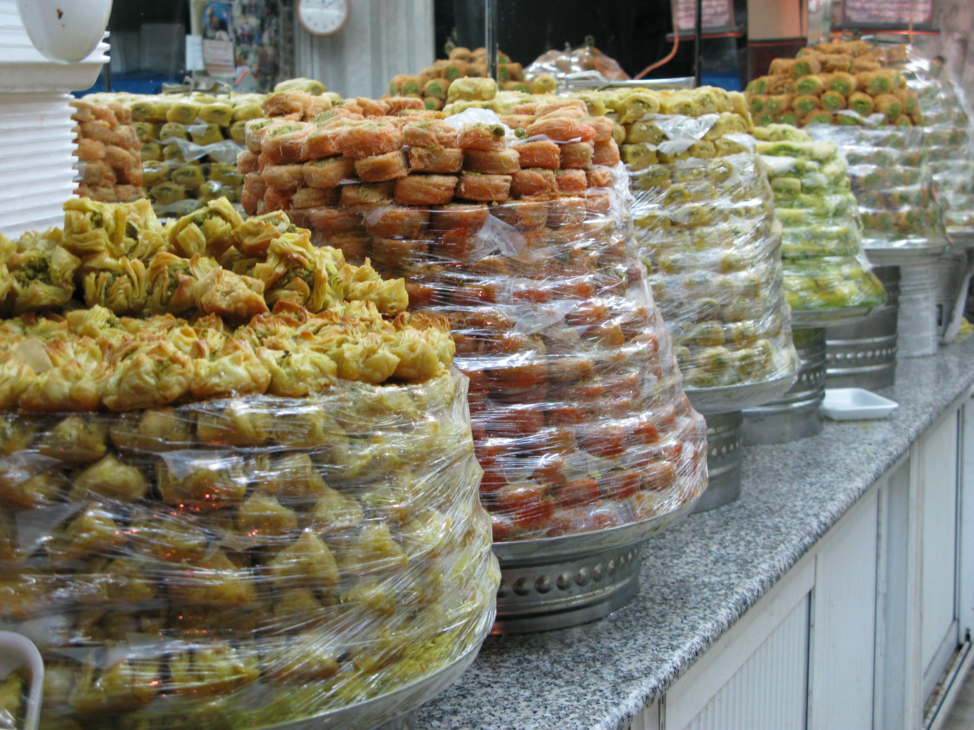 Jerusalem 277 Jerusalem